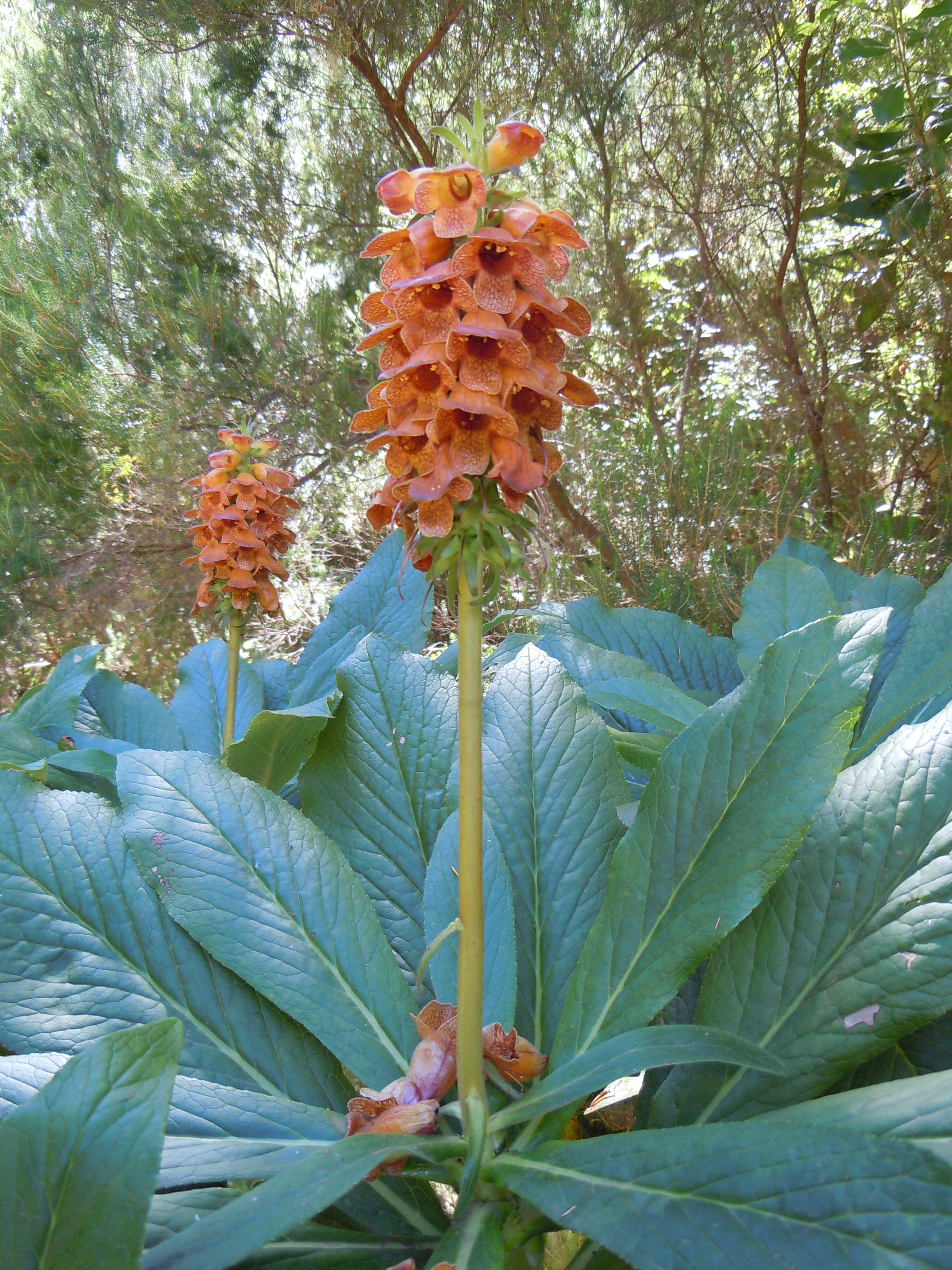 Digitalis sceptrum- Levada das 25 Fontes - Madere